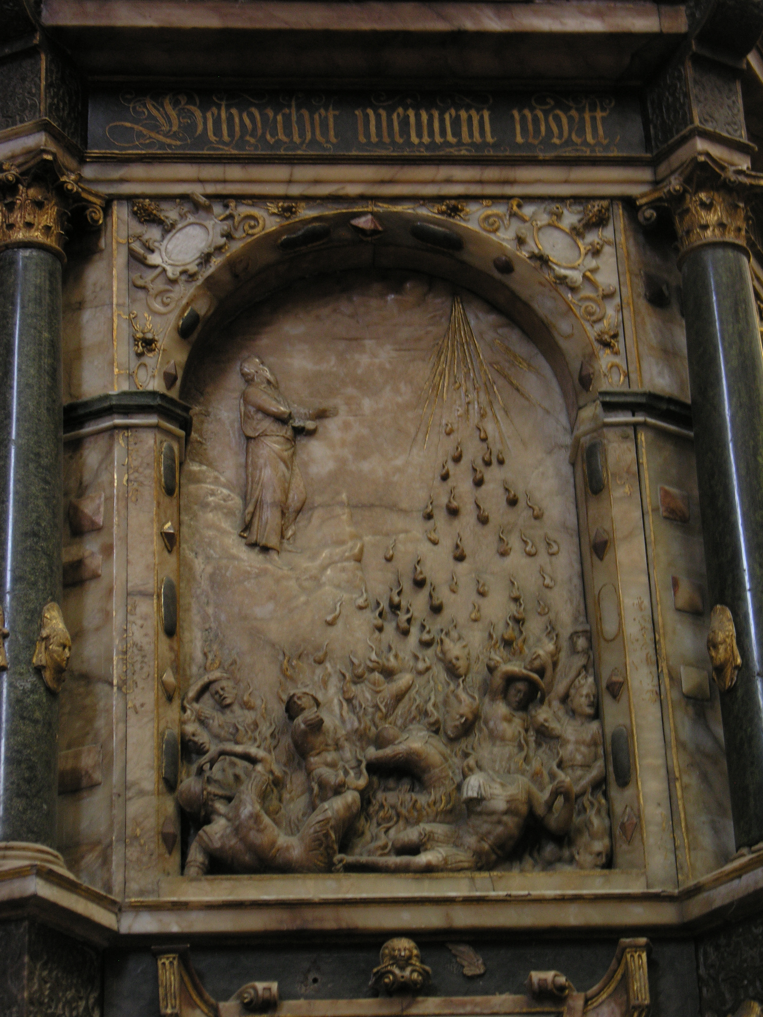 Friedrich Gross, Eliasz zsyła ogień na oddziały Ochozjasza. Fragment dekoracji ambony w kościele św. Marii Magdaleny we Wrocławiu, 1580-1583